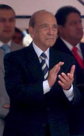 El Ex Alcalde de Guayaquil en la inauguración del monumento a Luis Alberto Costales en Riobamba